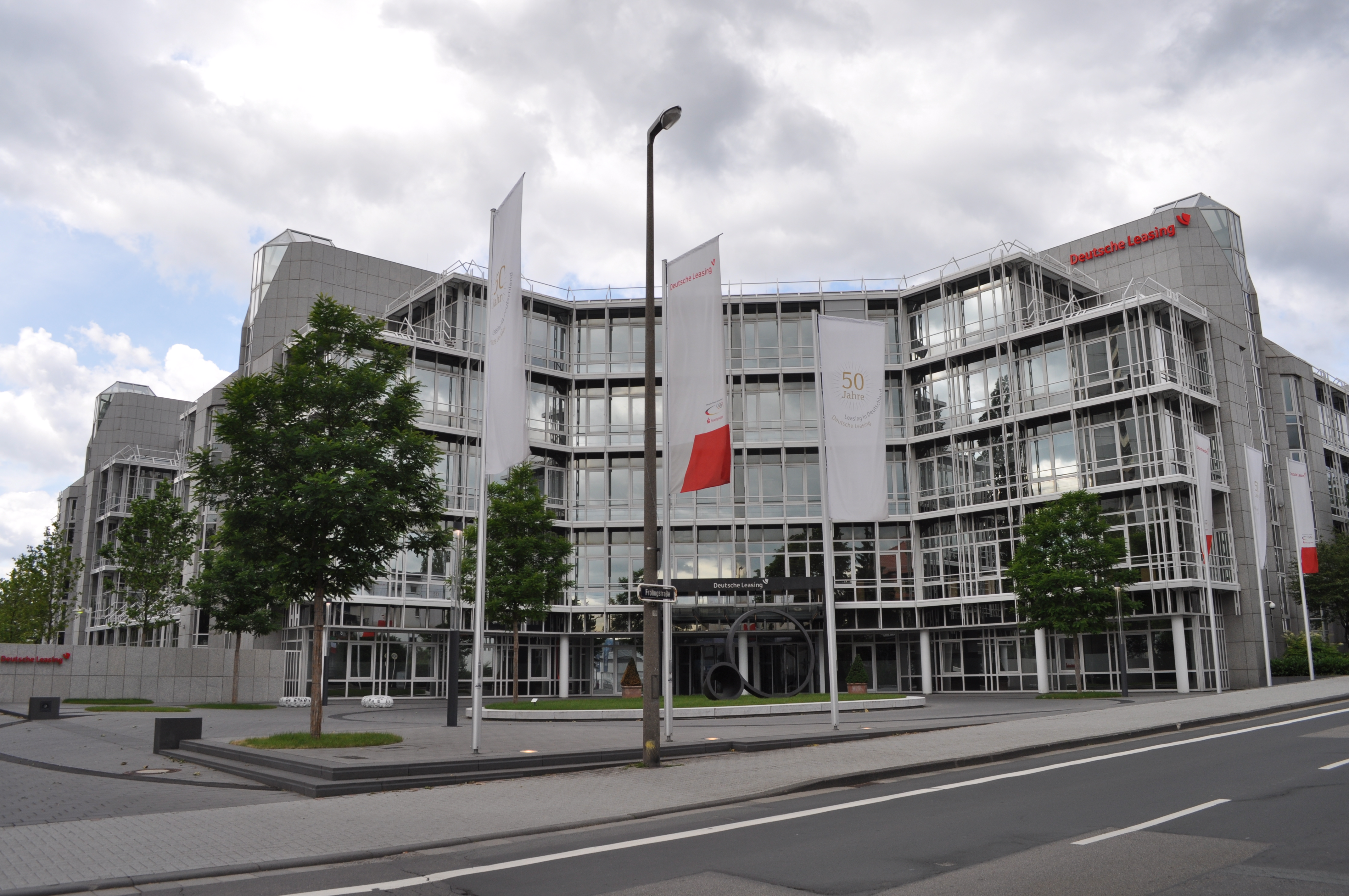 Bad Homburg, Deutsche Leasing